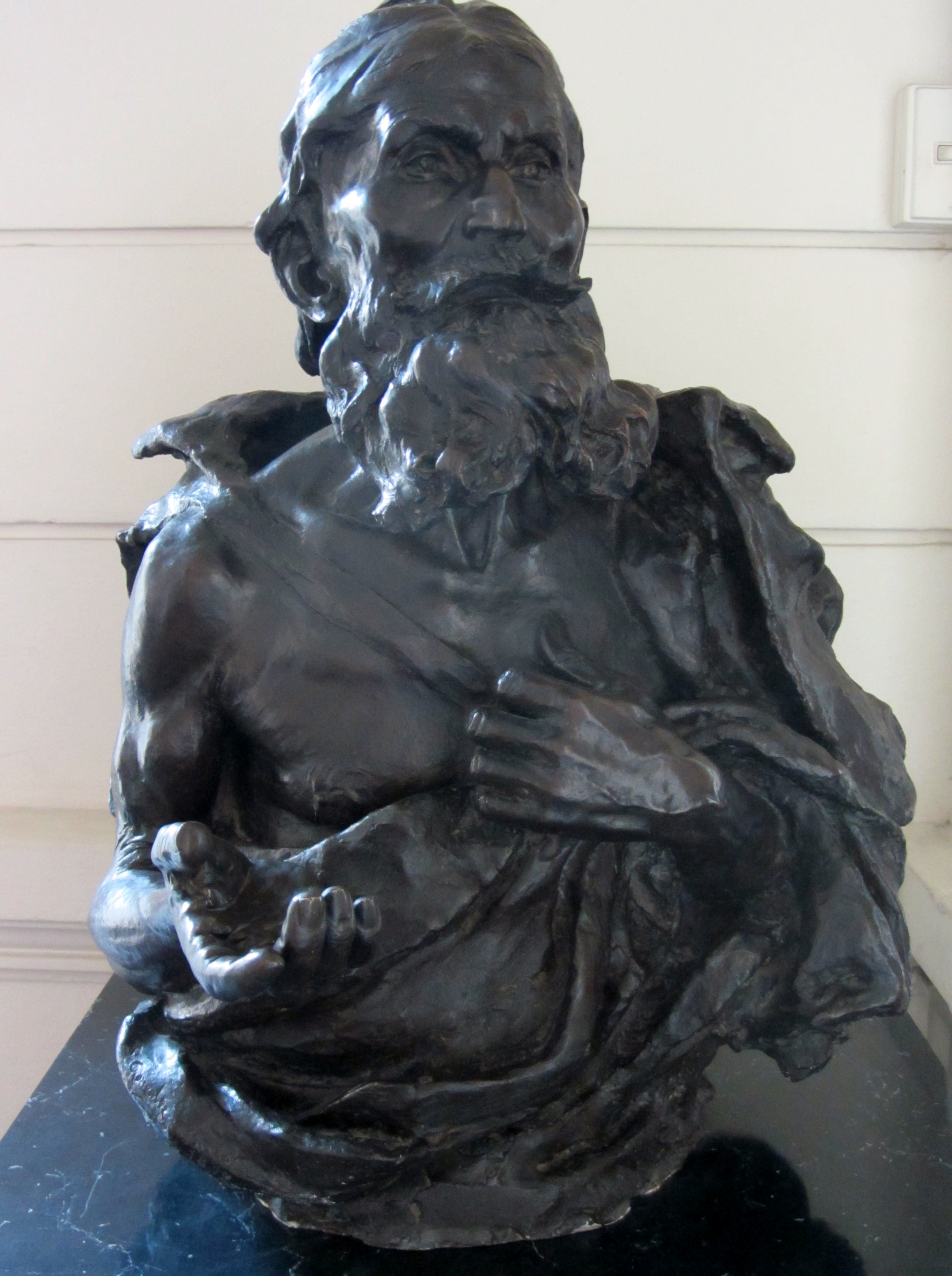 Detalle de la escultura